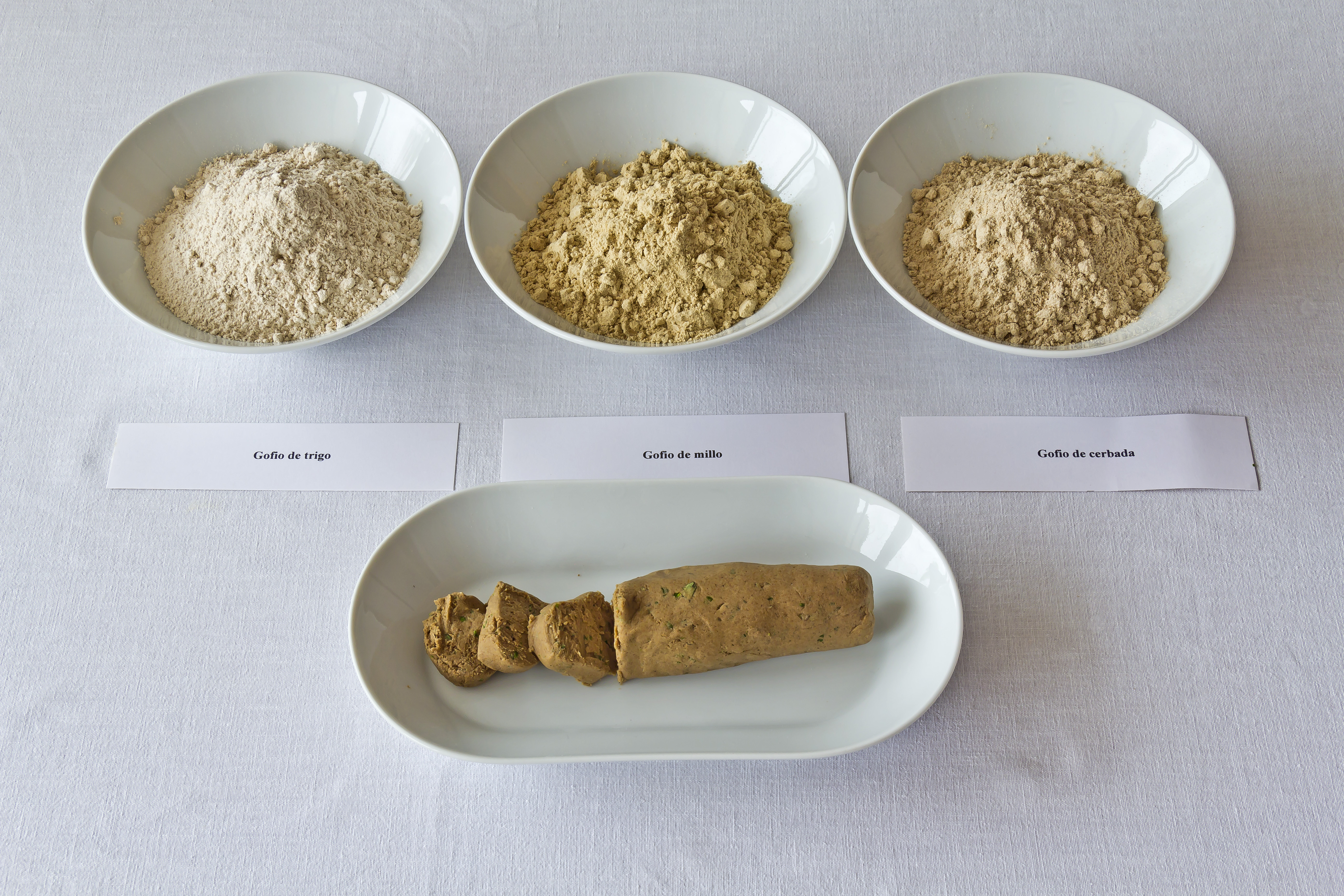 Gofio und pello de gofio